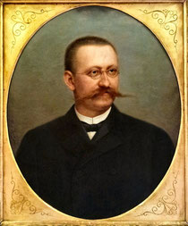 Franz Mohaupt (1854-1916), německý hudební skladatel a sbormistr